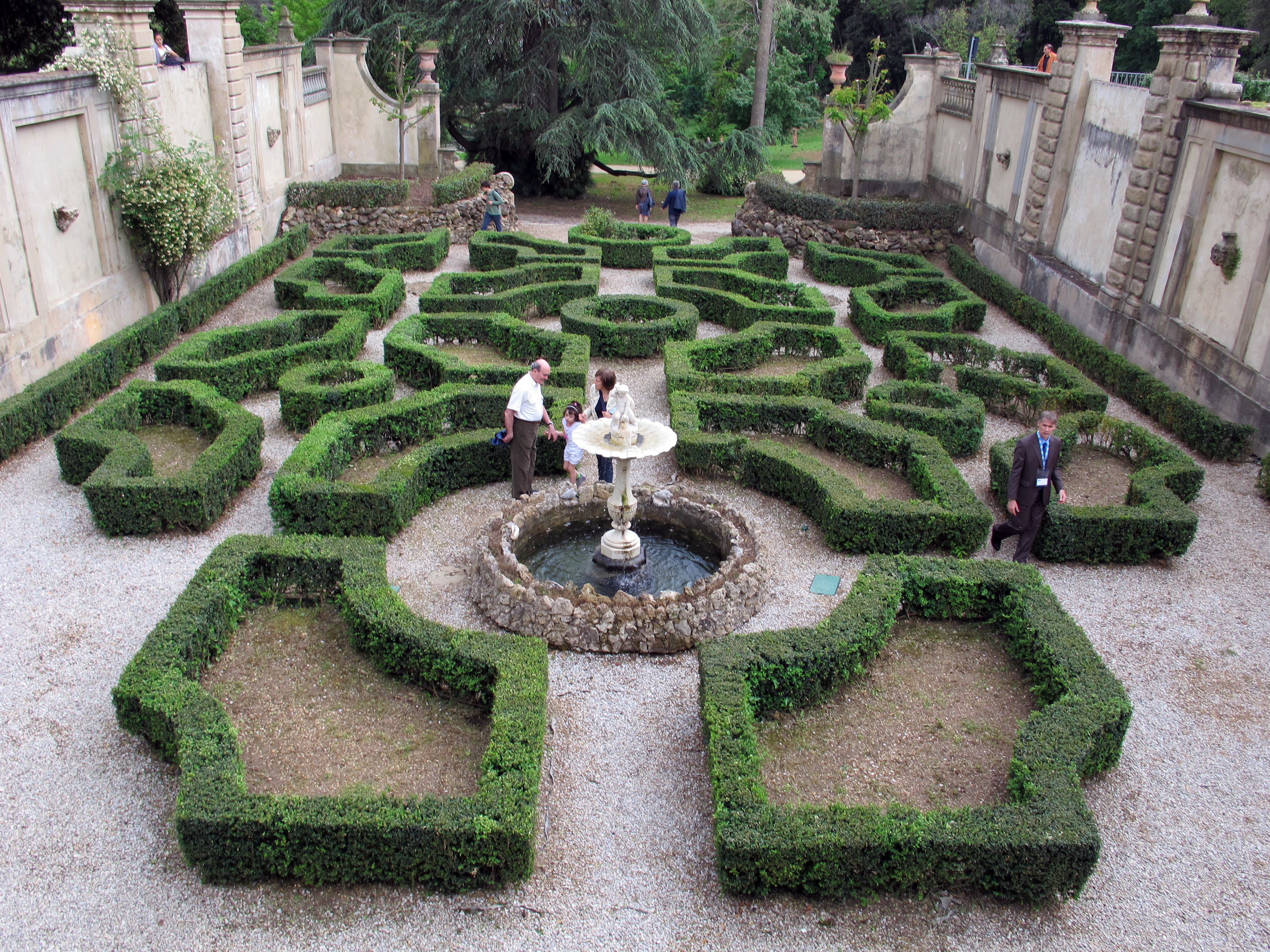 Villa salviati, giardino della limonaia